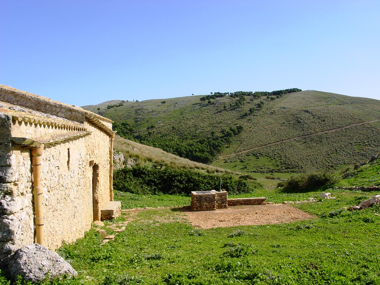 Riserva naturale dello Zingaro, Sicily Marcato della Mennola - Highlands